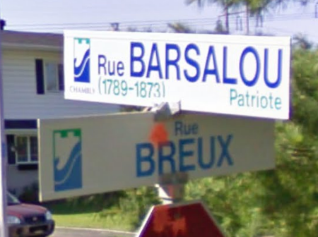 Français cadien: Rue Barsalou, patriote (1789-1793) / Rue Breux située à Chambly, Québec, Canada en 2009. Voie à mémoire du patriote capitaine Jacob (Barcelo) Barsalou. A gauche sont représentées les armoiries de la ville de Chambly.